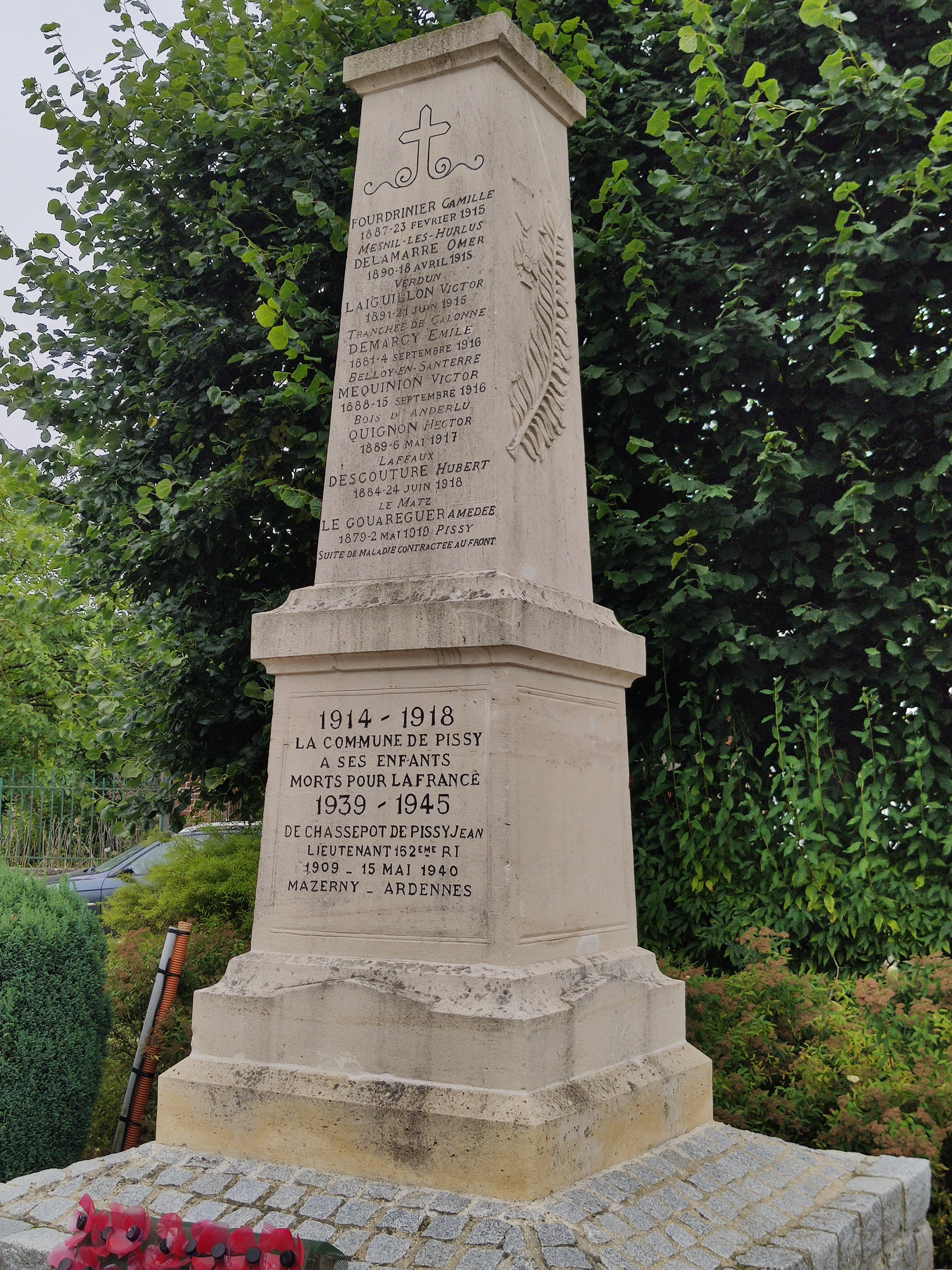 Pissy (Somme) : Monument aux morts